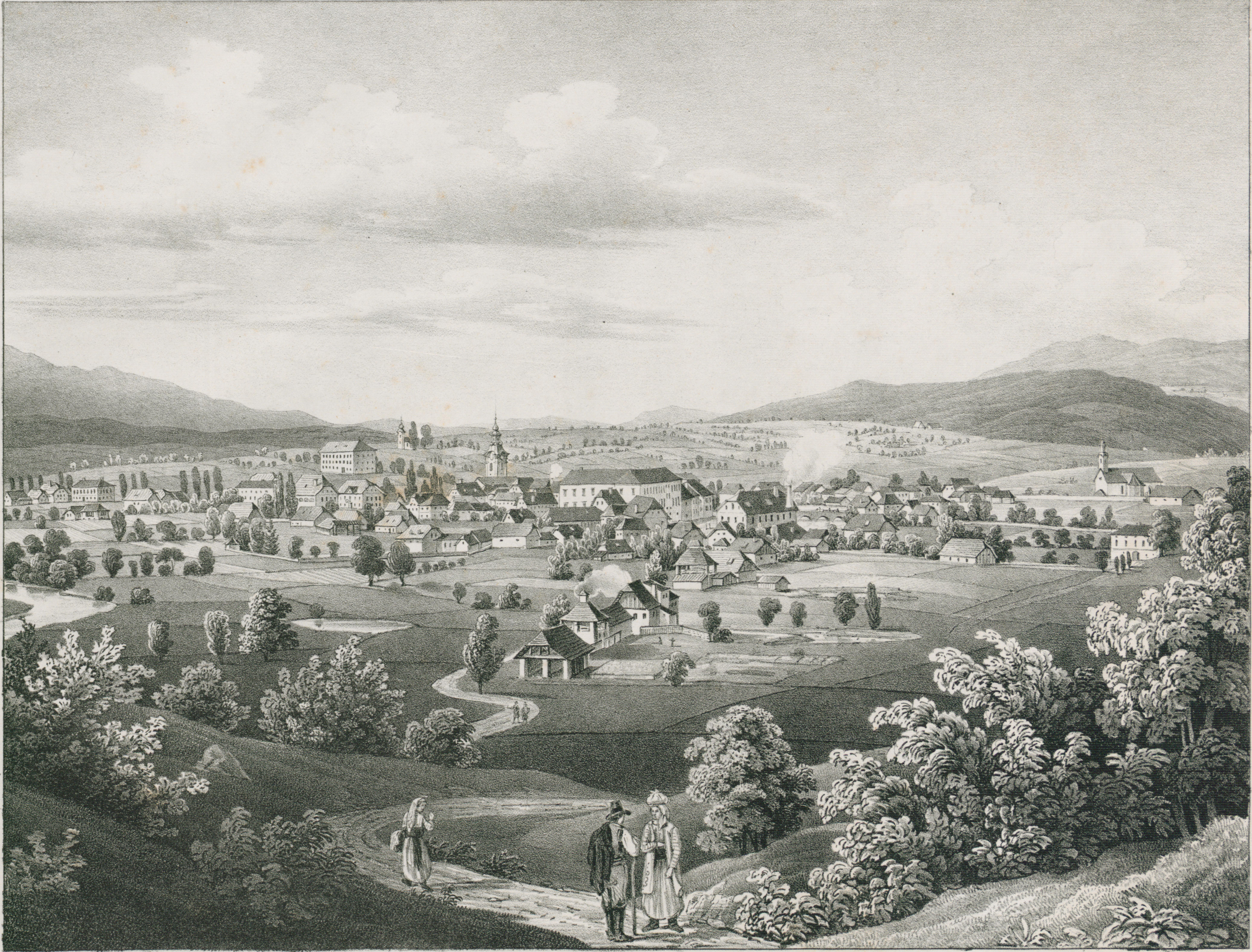 Litografija Kočevja iz zbirke Malerische Ansichten aus Krain.